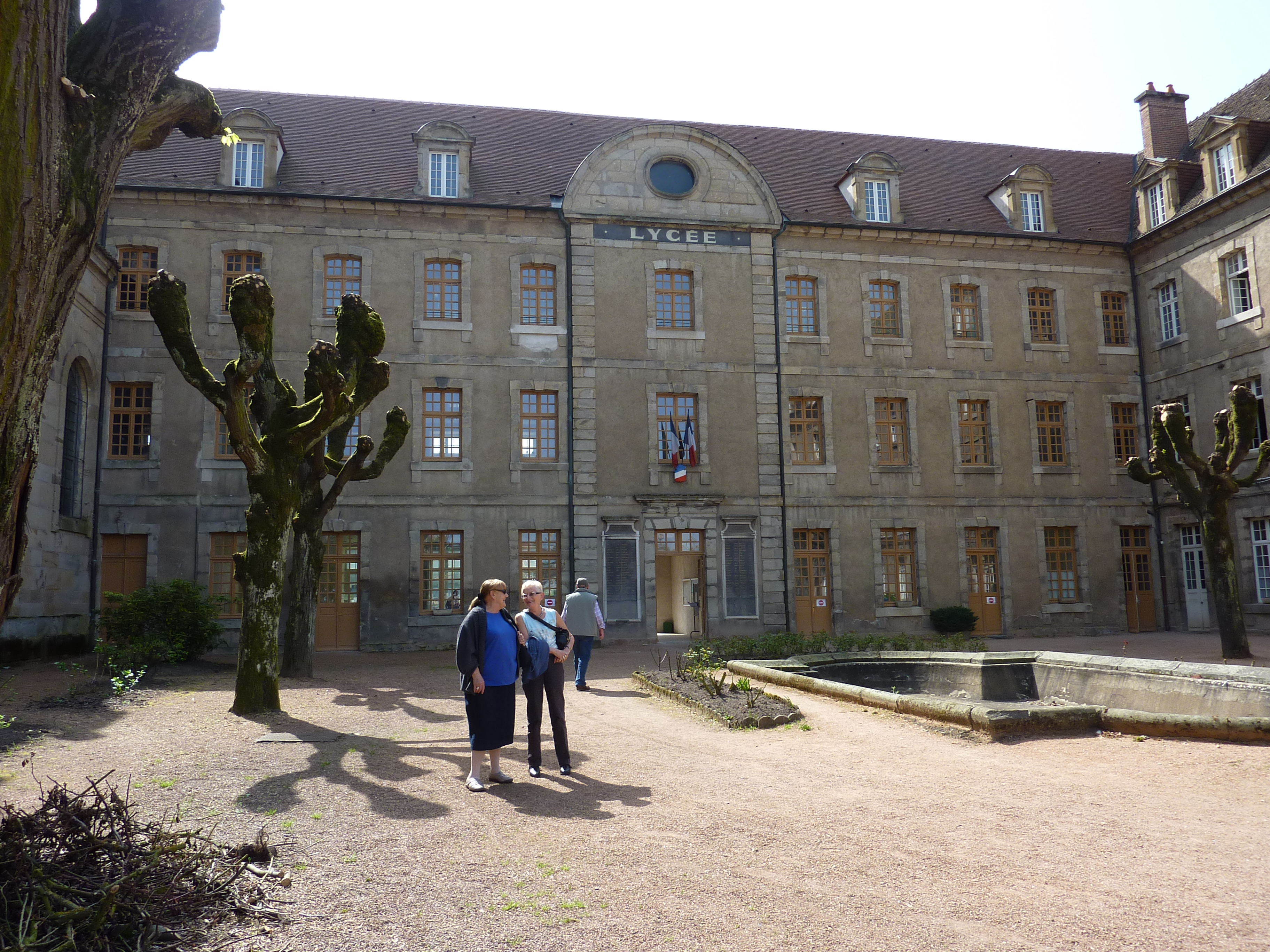 Autun : devant le lycée Bonaparte